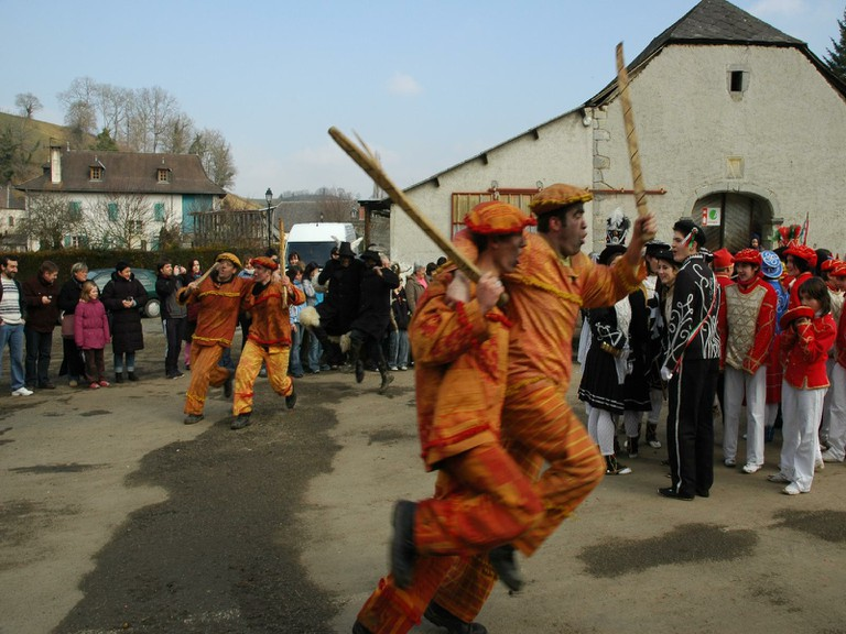 Urdiñarbeko maskarada Gameren, 2006ko otsailaren 5ean. Buhameak.